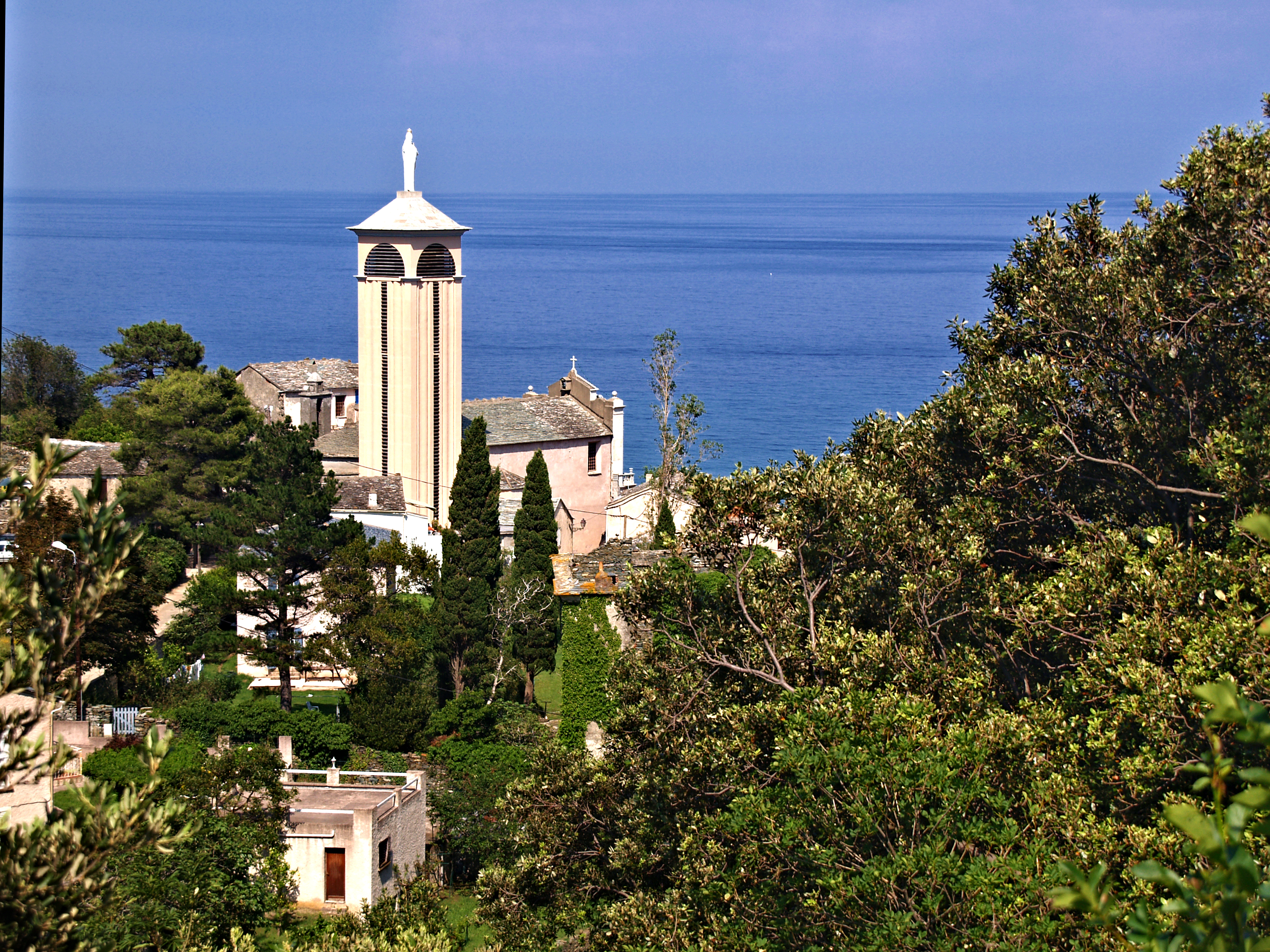 Brando - Sanctuaire Notre-Dame de Lavasina, ancien couvent des Franciscaines